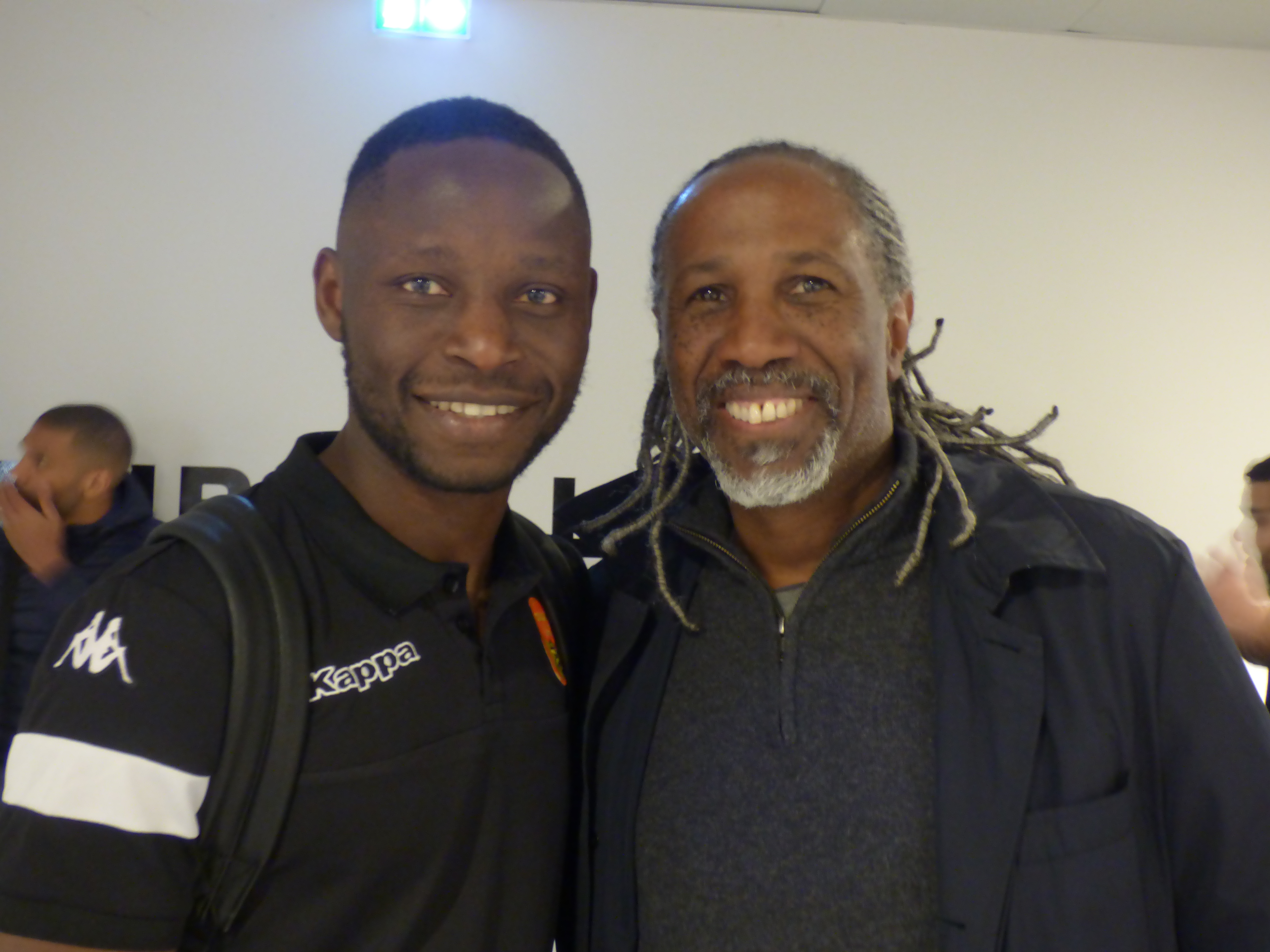 Joseph Lopy et Jimmy Adjovi-Boco après le match RC Lens / US Orléans, le 17 mai 2019, comptant pour la 38ème journée du championnat de France de football de Ligue 2 2018-2019, au Stade Bollaert-Delelis.